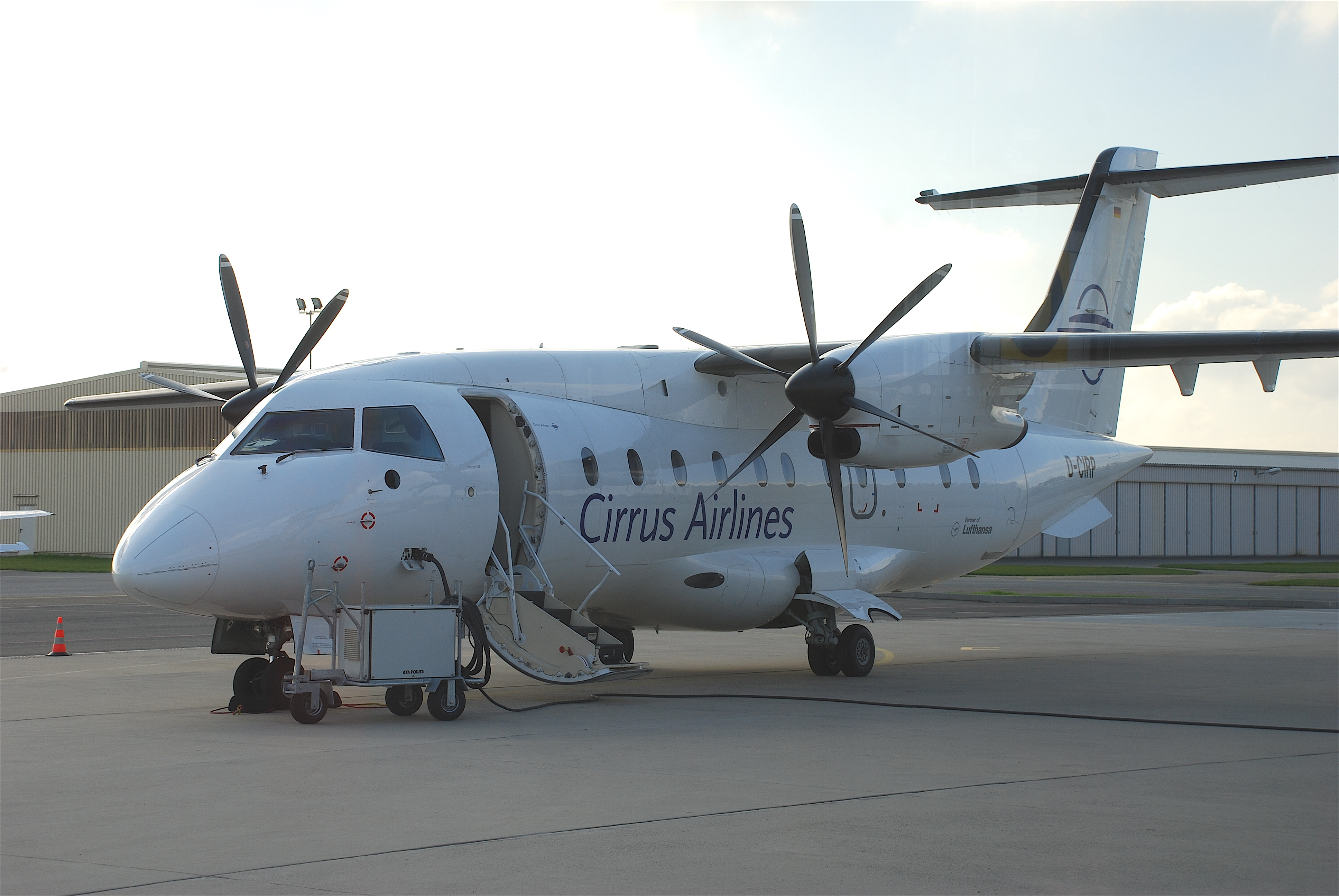 Cirrus Airlines Dornier 328; D-CIRP@MHG;23.10.2008/532aa